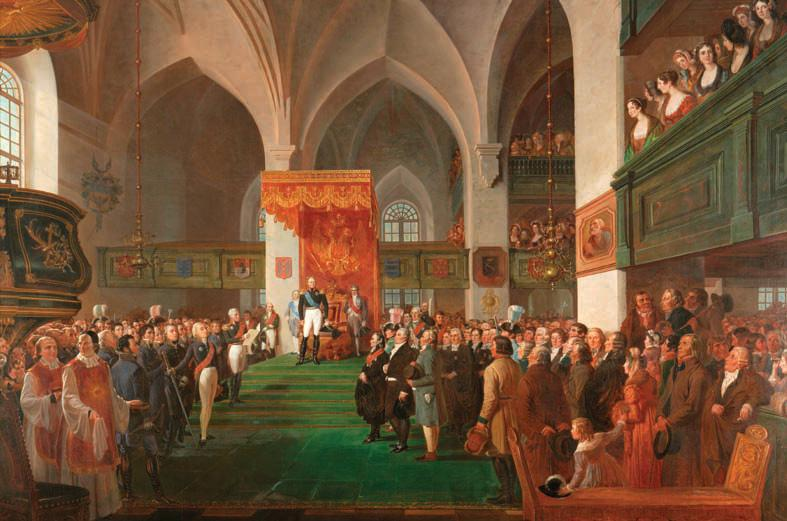 Robert Wilhelm Ekmanin historiamaalaus Porvoon valtiopäivien avajaiset, jonka Suomen keisarillinen senaatti tilasi. Maalauksen oli tarkoitus olla uusi versio Emanuel Thelningin vuoden 1812 samannimisestä maalauksesta, mutta Ekman teki aiheesta itsenäisen teoksen. Maalaus sijaitsee nykyään Helsingin Valtioneuvoston linnassa, valtioneuvoston istuntosalissa.